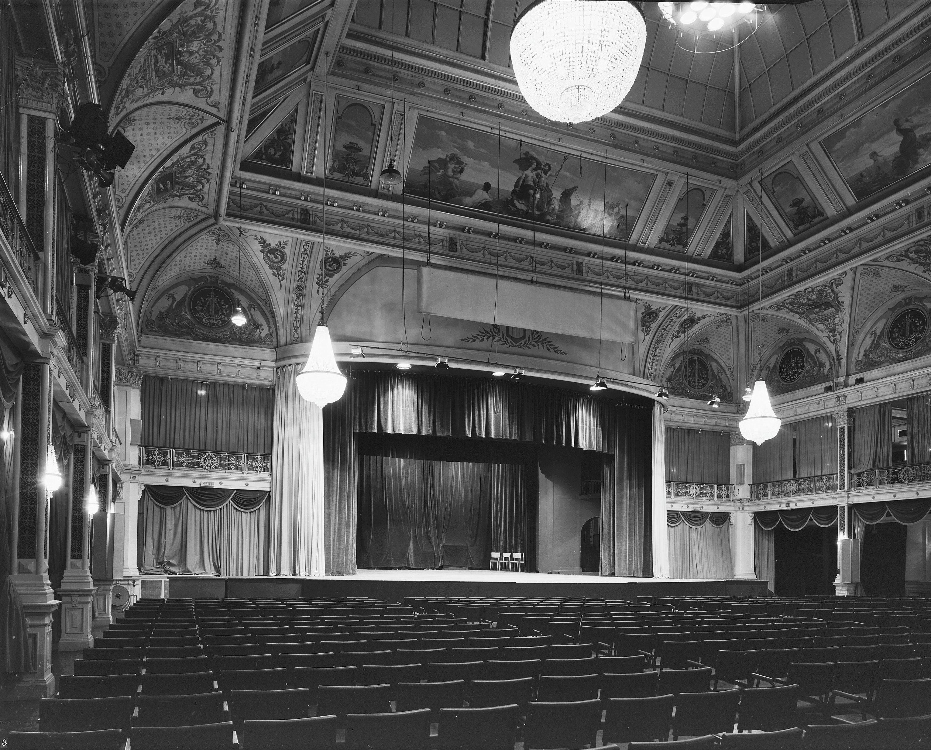 Kurhaus: interieur Kurzaal